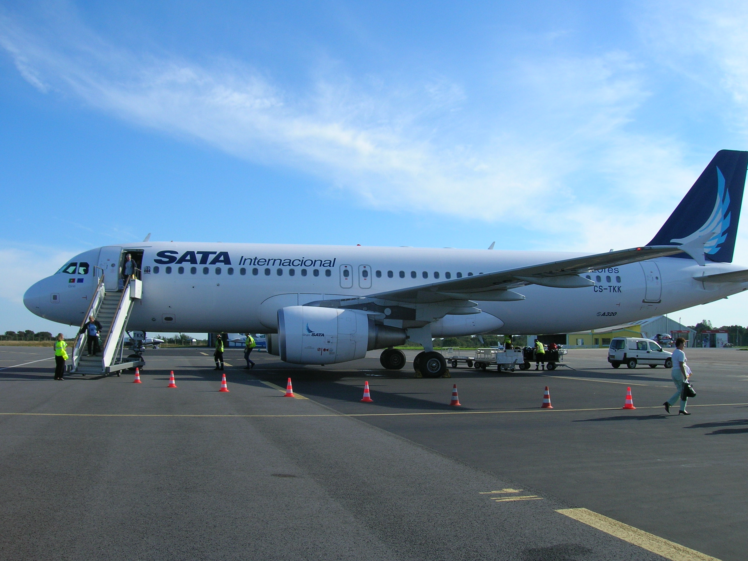 Airbus A 320/200 (CS-TKK "Corvo") de la SATA Air Açores Internacional en provenance de Lisbonne (vol spécial), sur le tarmac de Maupertus, le 23 septembre 2006.